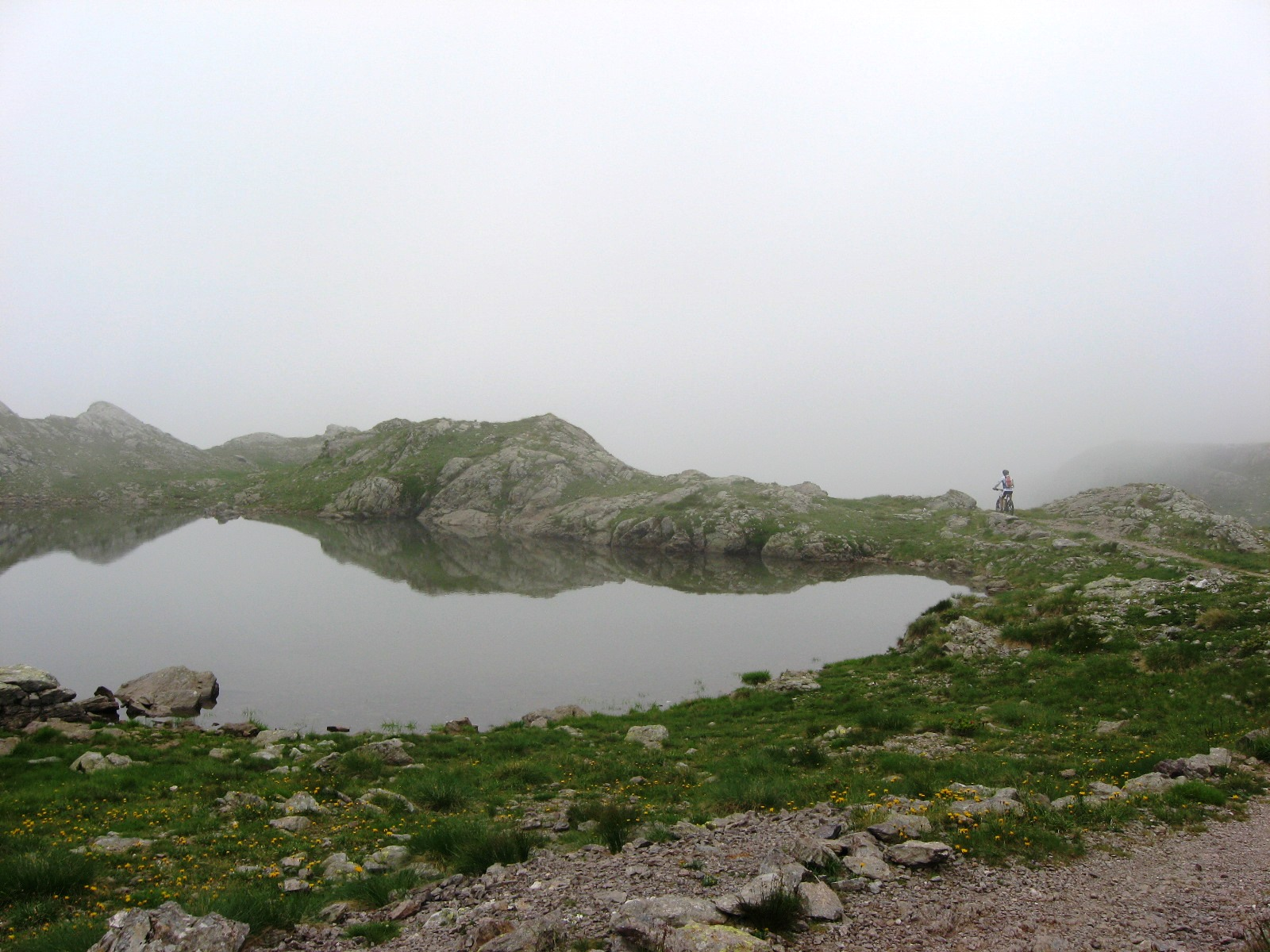 Laghi di Venerocolo. Il lago piccolo. Val di Scalve. Prealpi Orobie (BG)